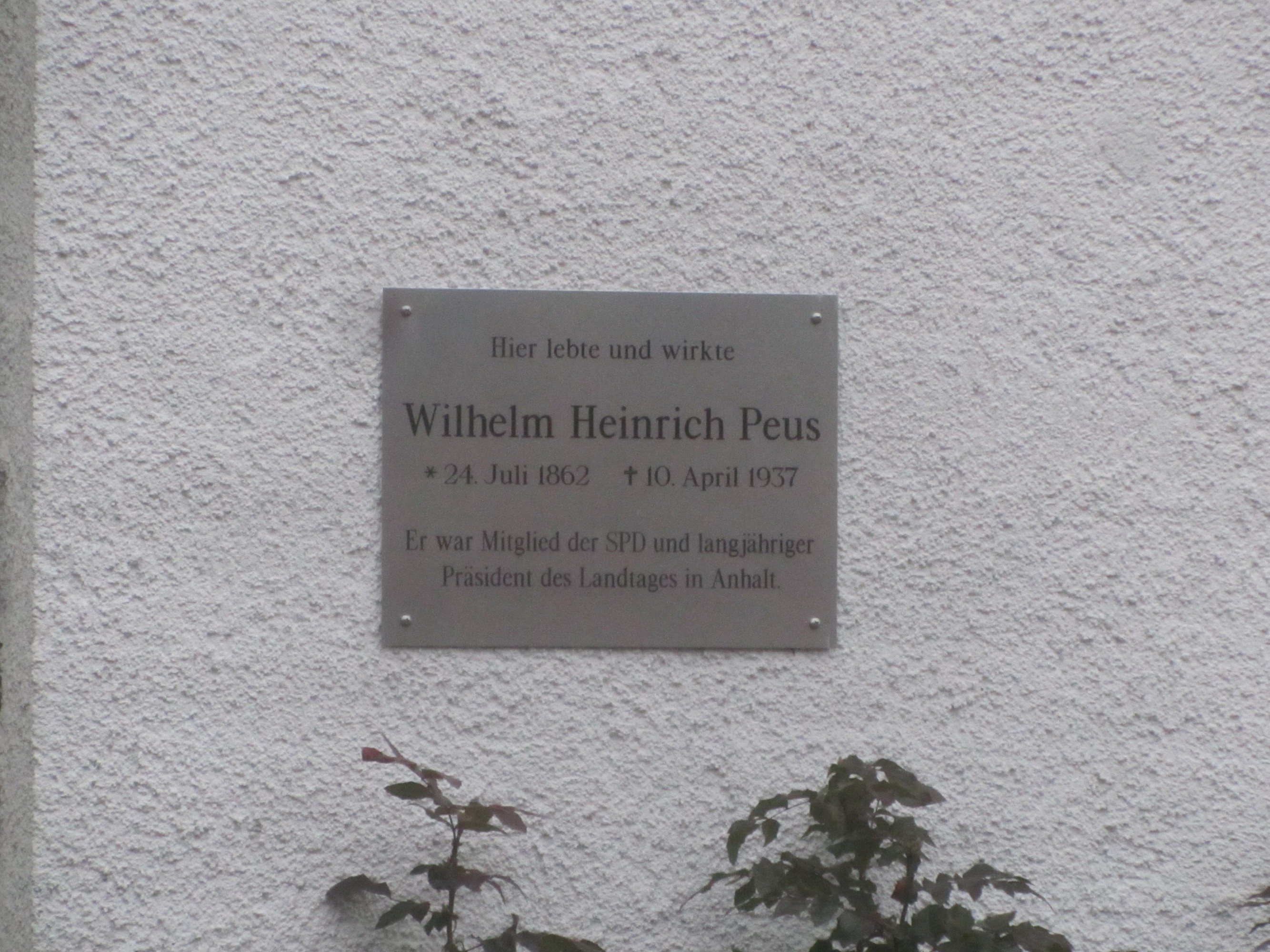 Dessau, Kiefernweg 18. Gedenktafel für Heinrich Peus an seinem ehemaligen Wohnhaus.